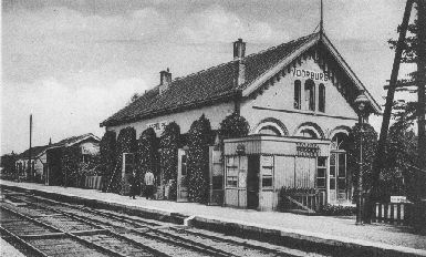 Station Voorburg omstreeks 1925. Afbeelding van prentbriefkaart, fotograaf onbekend